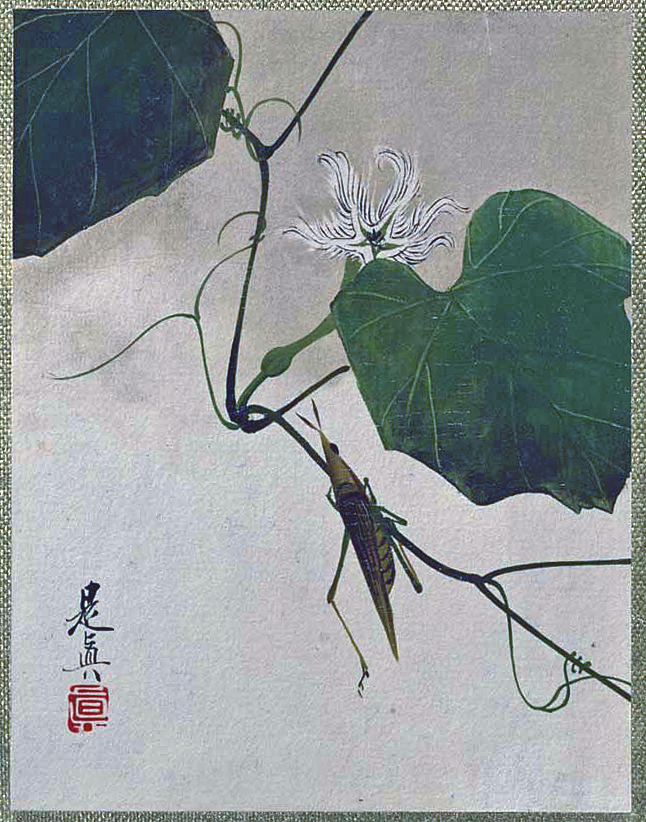 漆絵画帳 蟷螂 柴田是真 明治時代